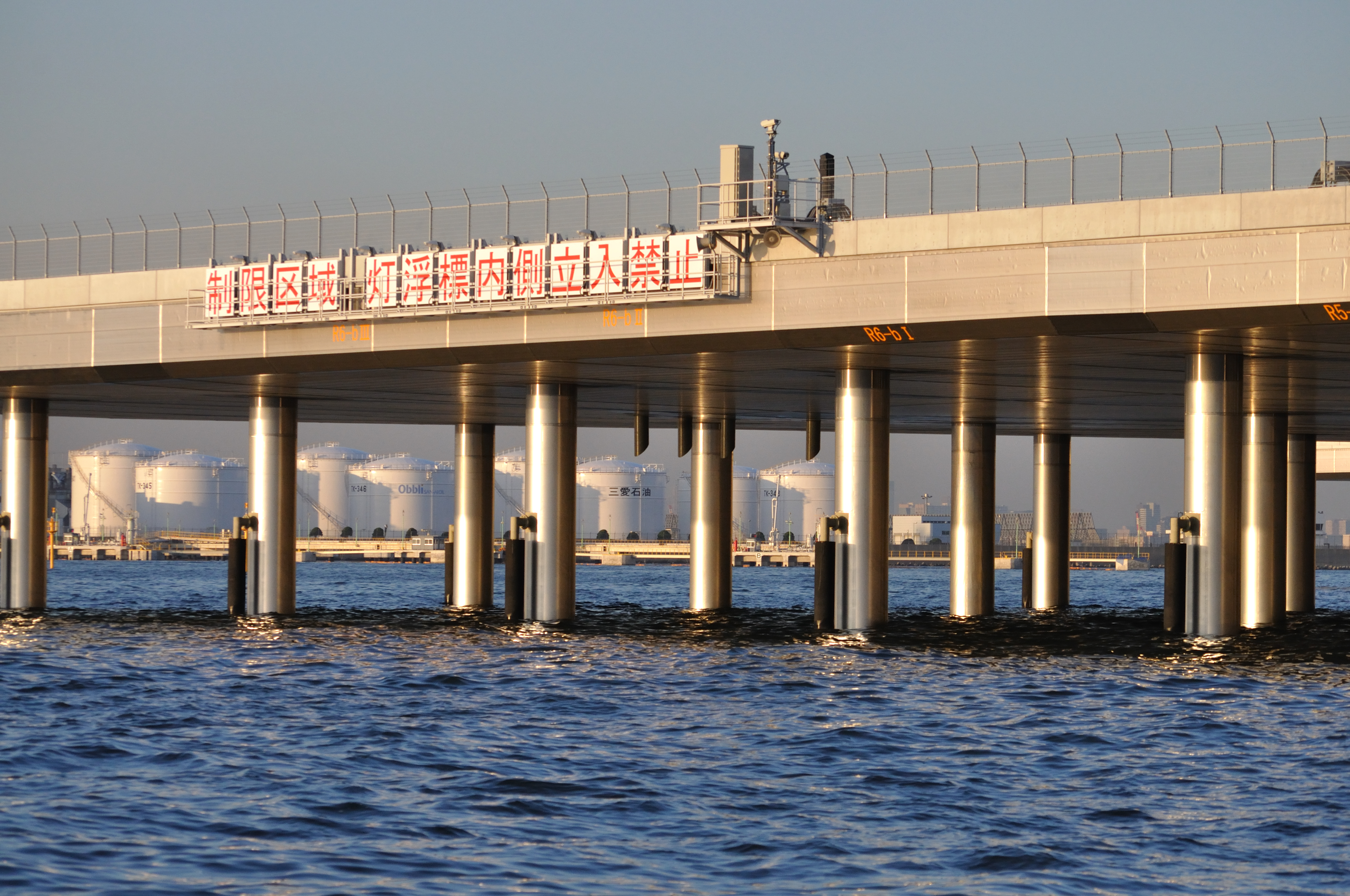 海面からみた羽田空港D滑走路。Panoramioより転載。